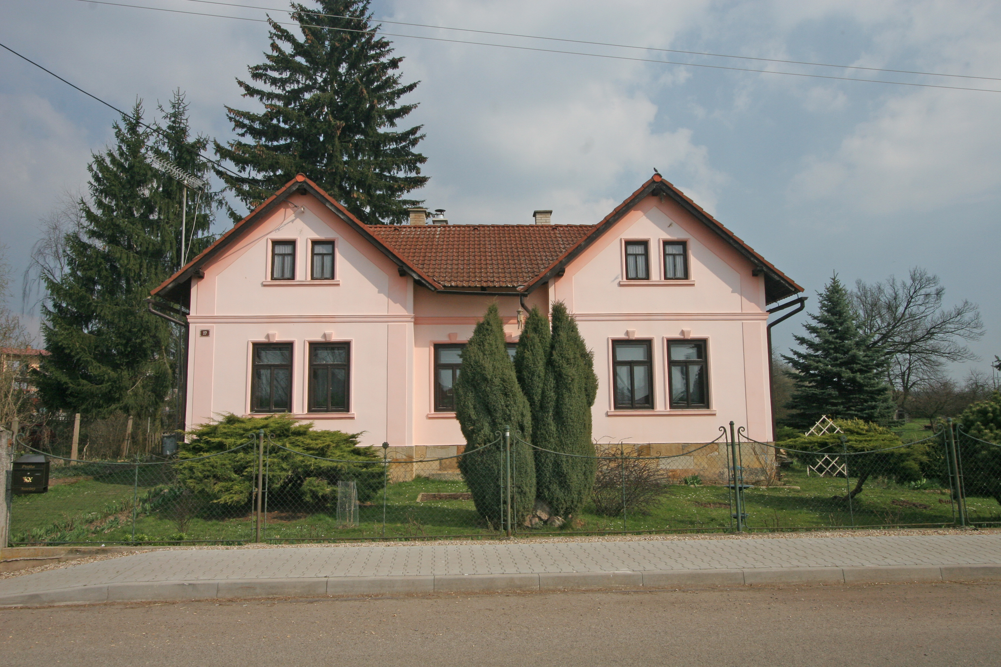 Kacákova Lhota čp. 17